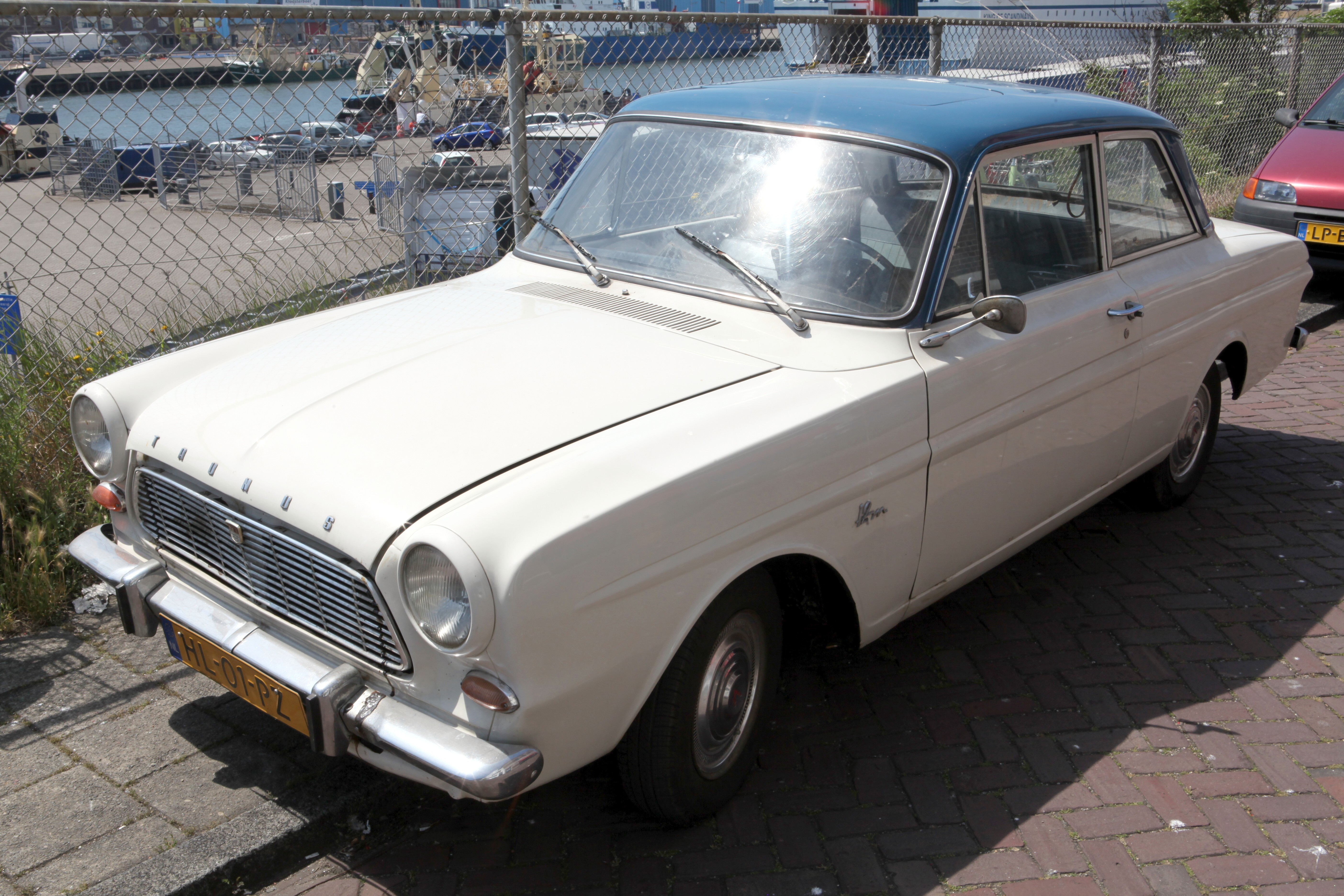 Ford Taunus 12 M